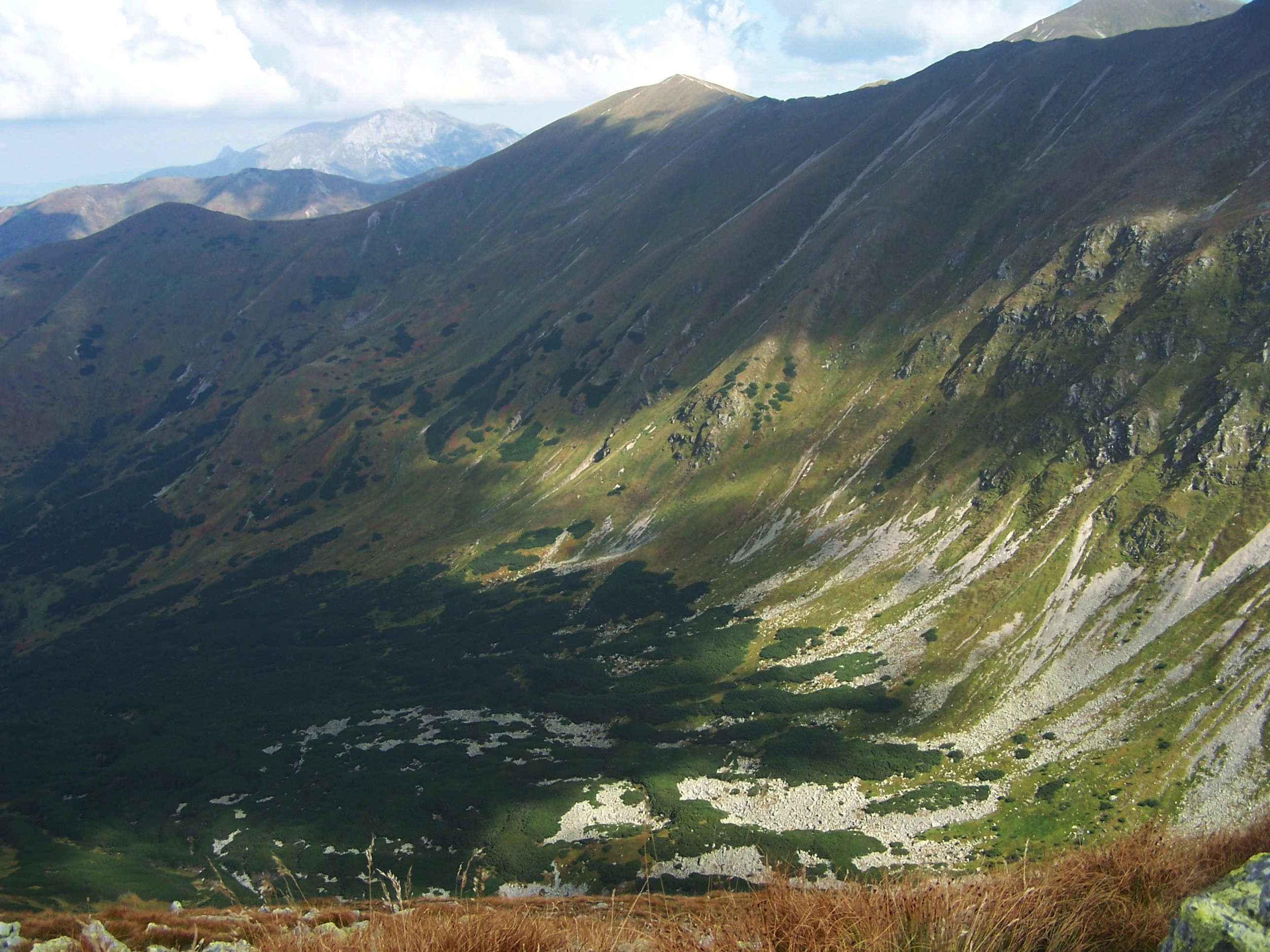 Jarząbcza Rówień w Dolinie Jarząbczej